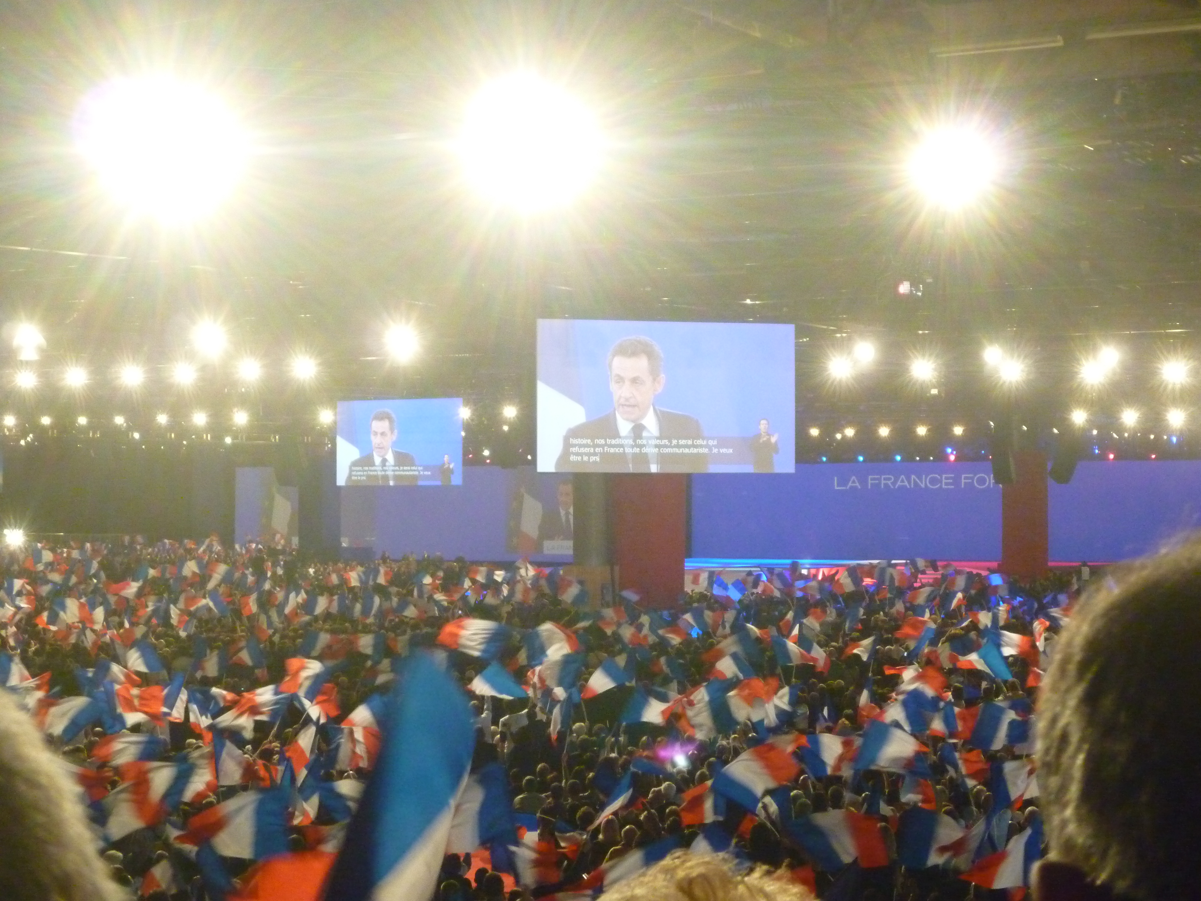 Meeting du 11 mars 2012 à Villepinte